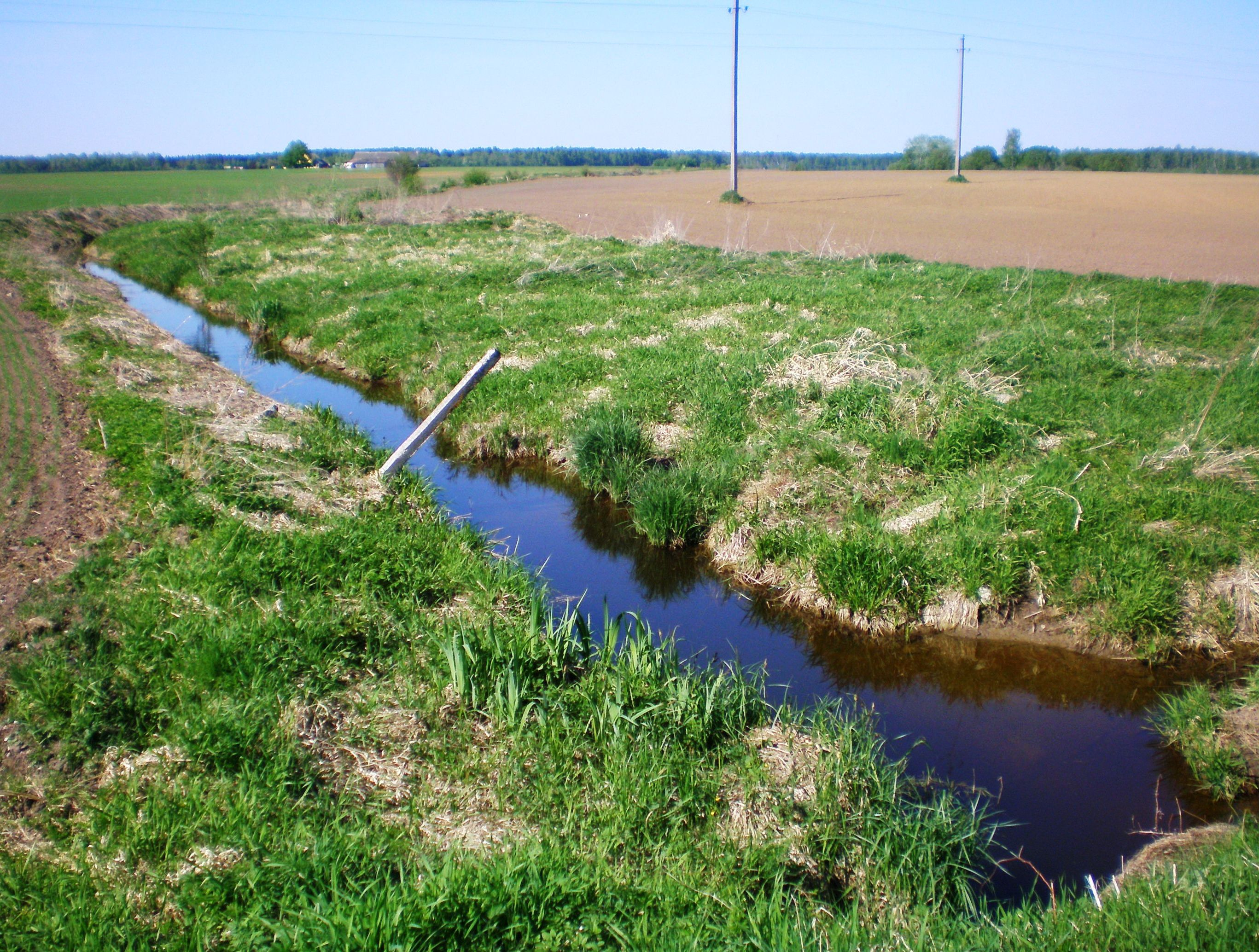 Indija netoli Pašėtės, Kėdainių raj.